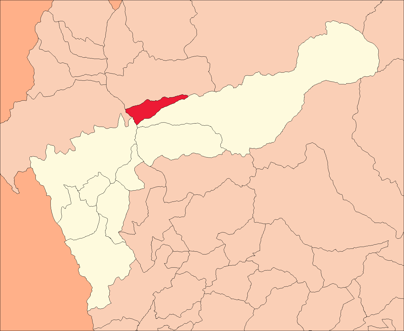 Ubicación del distrito de Quivilla.